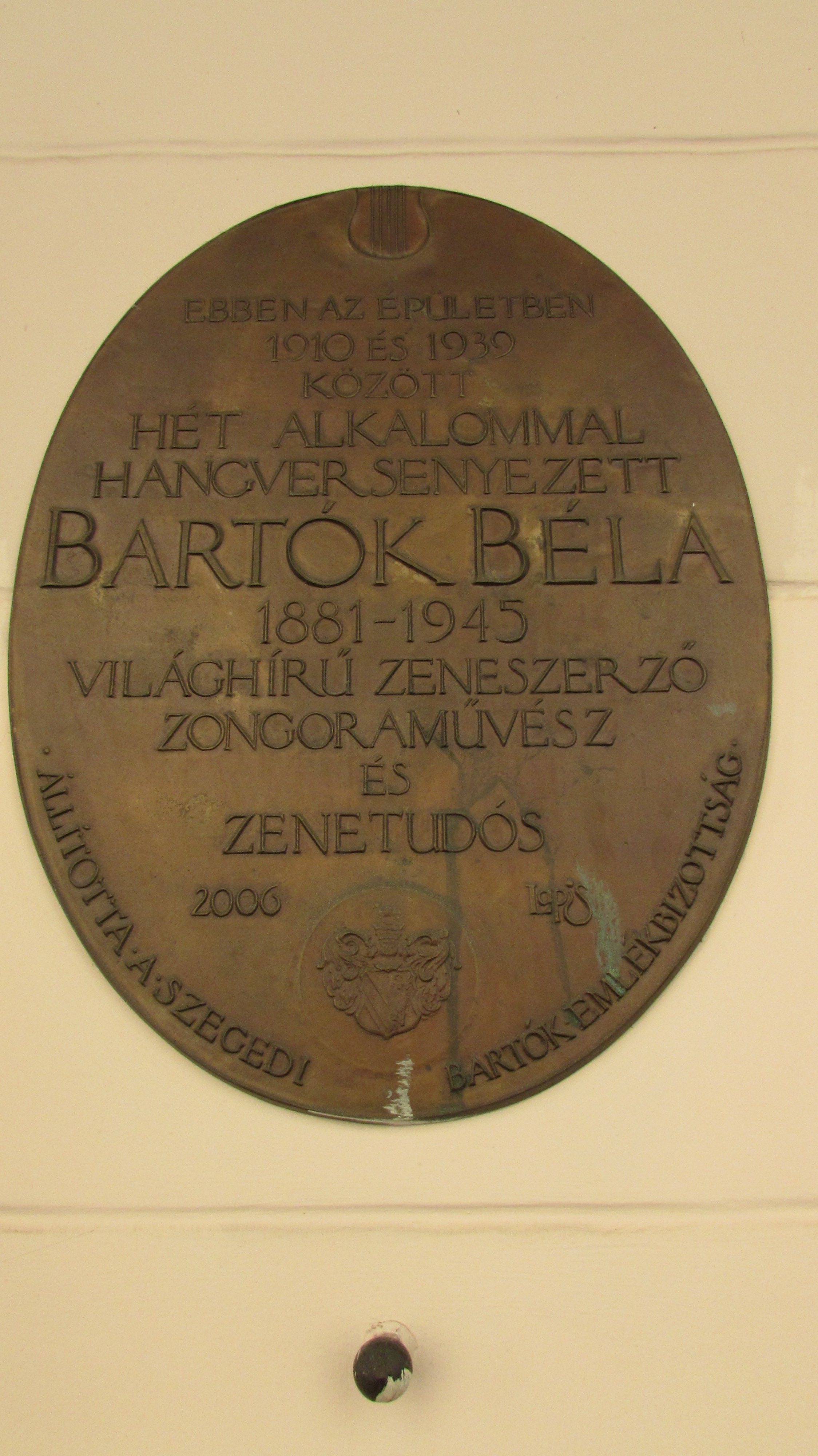 Béla Bartók Plakette Szeged